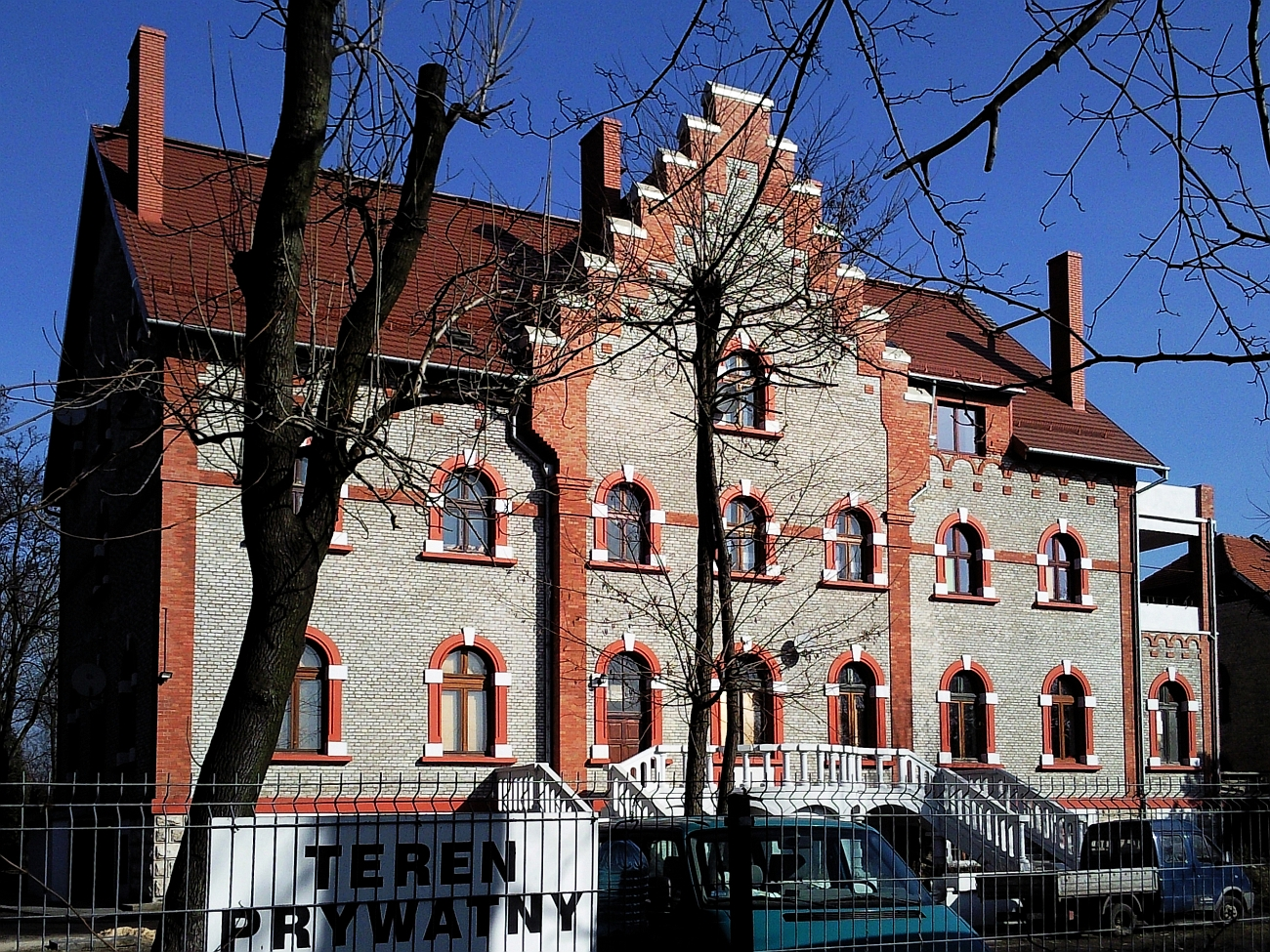 Budynek mieszkalny przy ulicy Sikorskiego 3 w dzielnicy Piaski